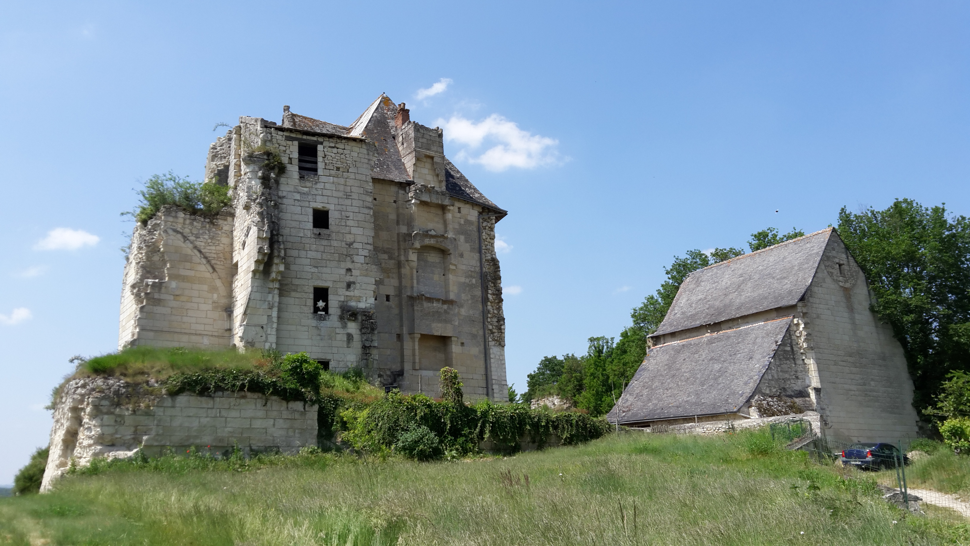 Château de Crissay-sur-Manse, Indre-et-Loire, France, XVème siècle :donjon et chapelle en 2018